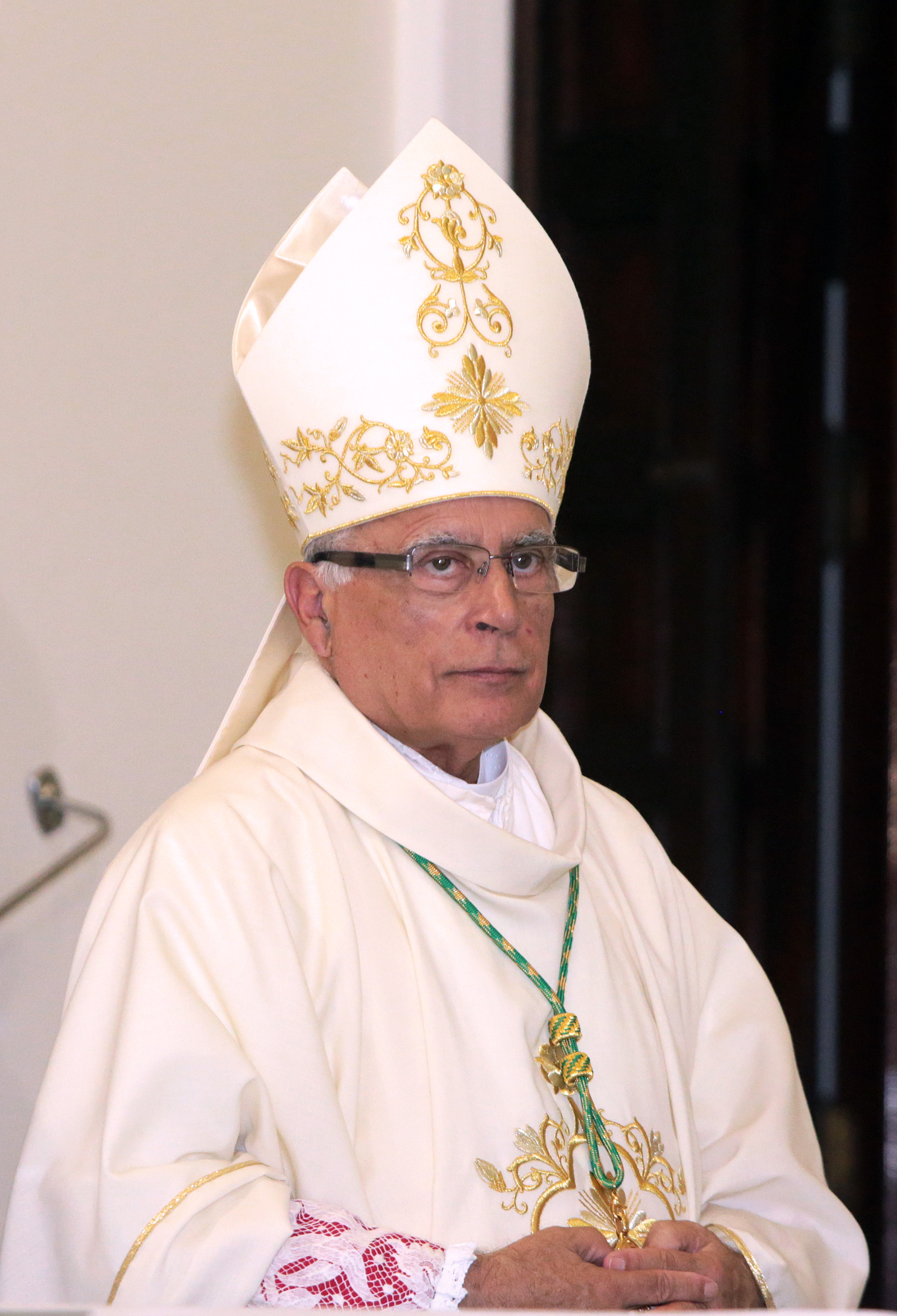 24-Sep-2016 Toma de posesión de Carmelo Zammit del cargo de Obispo de Gibraltar en la Catedral católica de Santa María la Coronada. Tras la procesión de obispos y sacerdotes por la Calle Real hasta una Catedral abarrotada con las puertas totalmente abiertas (no cerradas, como era costumbre) allí se encontró con el Obispo Heskett, administrador apostólico y el rector de la Catedral, Monseñor Paul Bear. A la ceremonia de toma de posesión y eucaristía asistieron, entre otros, el Ministro Principal de Gibraltar, Fabián Picardo, y el Gobernador de Gibraltar, Ed Davis. Además, asistió en representación del gobierno maltés el Ministro Stefan Buontempo, ya que en Malta fue ordenado Zammit Obispo de Gibraltar. Otras personalidades en el evento: Daniel Feetham, líder de la oposición parlamentaria, el portavoz del Parlamento y Alcalde de Gibraltar,Adolfo Canepa, el Viceministro Principal, Joseph García, el Ministro Joe Bossano y el ex Ministro Principal, Peter Caruana